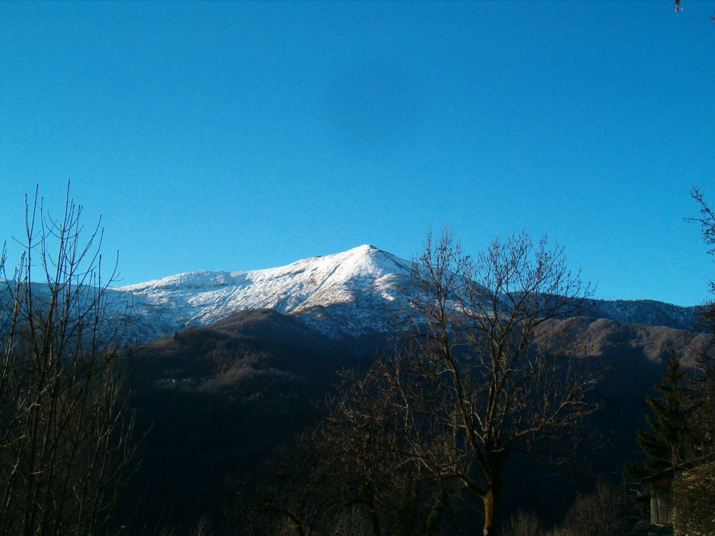 Monte Birrone (Frassino, Valle Varaita, CN) visto dalla frazione Meira Barba Giors.